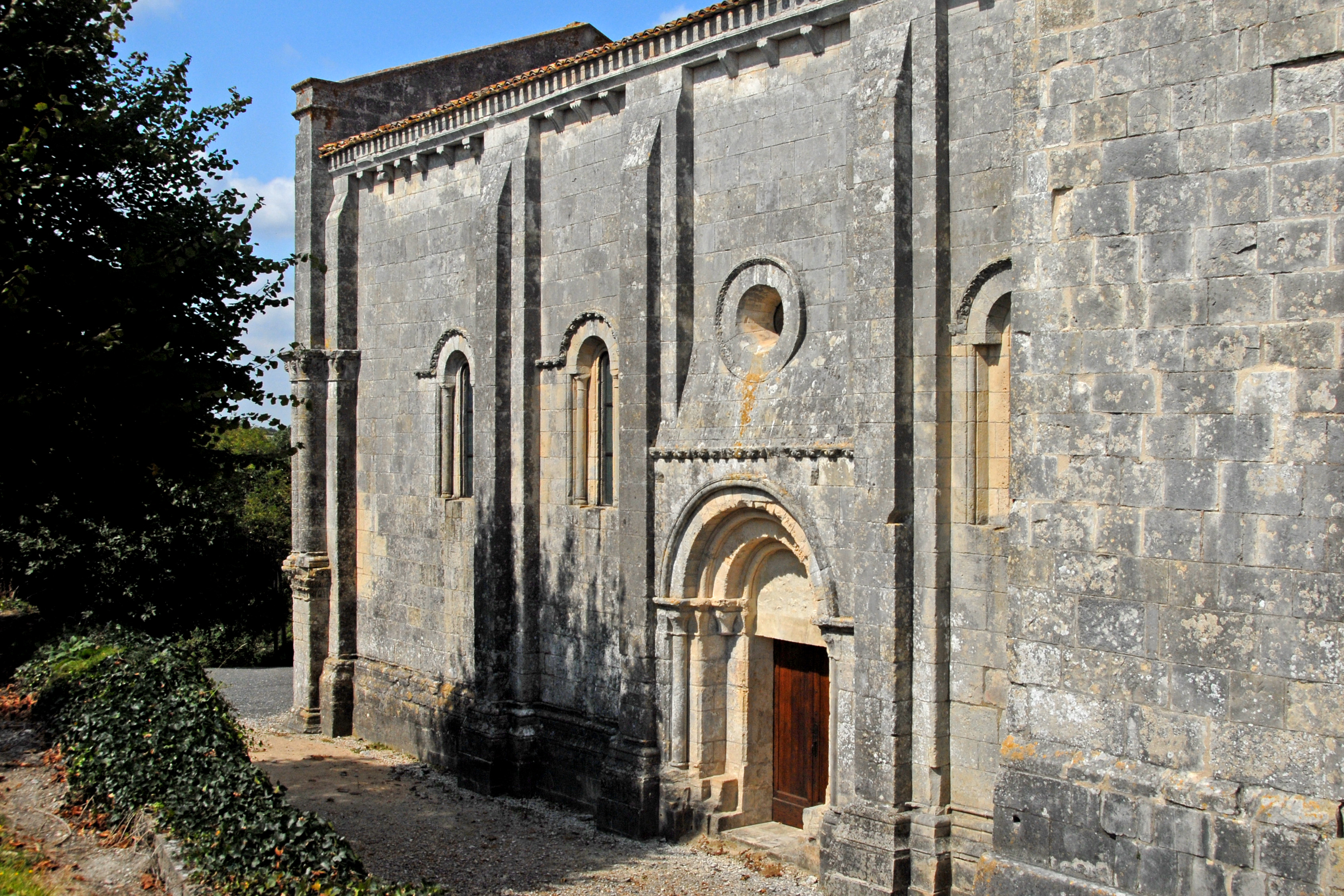 Echebrune, St.-Pierre, Schiff, Südwand, Südportal